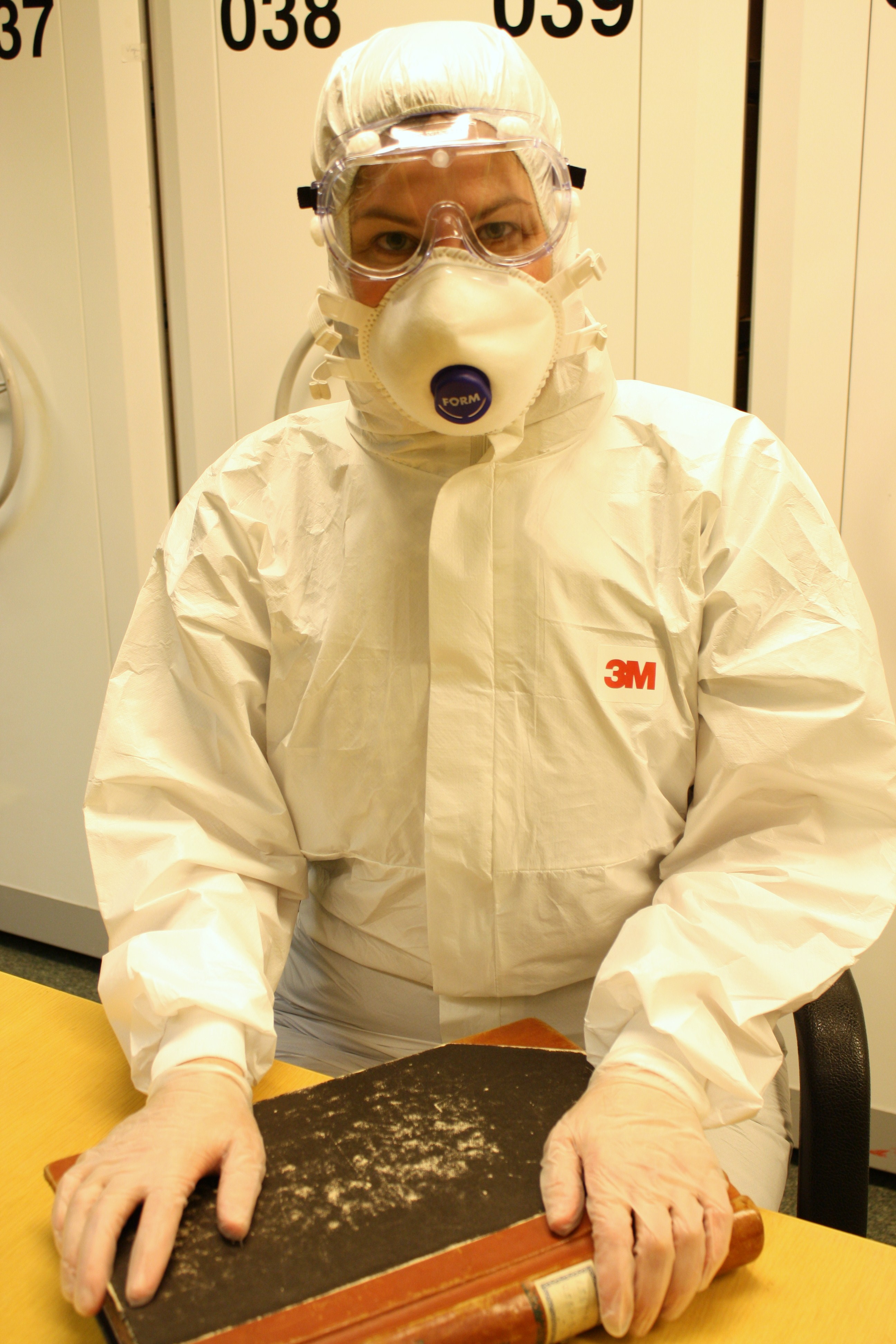 Personlig verneutstyr